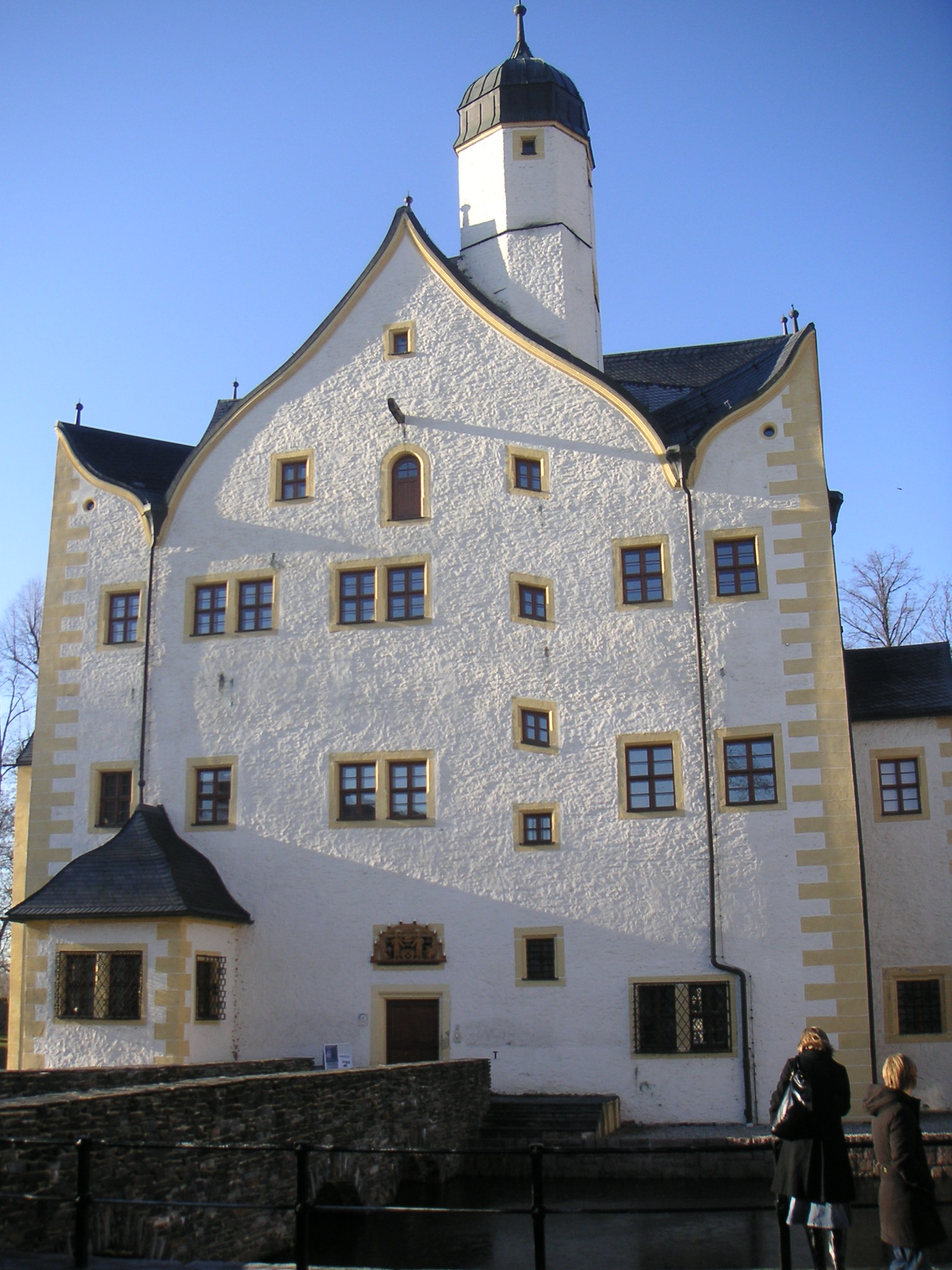 Schloss Klaffenbach in Chemnitz-Klaffenbach, Ostfassade; Denkmalnummer 09205018